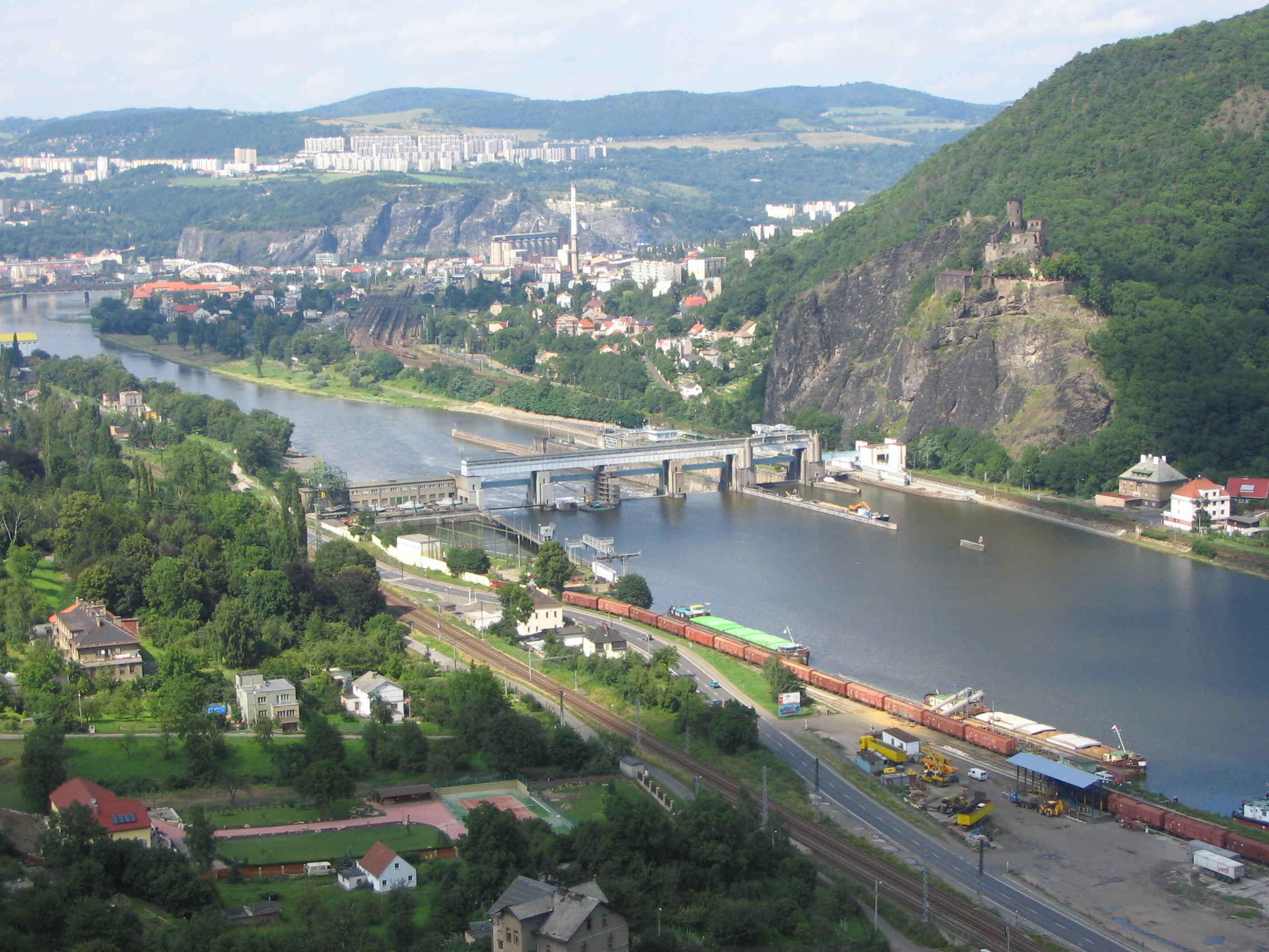 Zdymadlo Střekov, pod hradem, Střekov